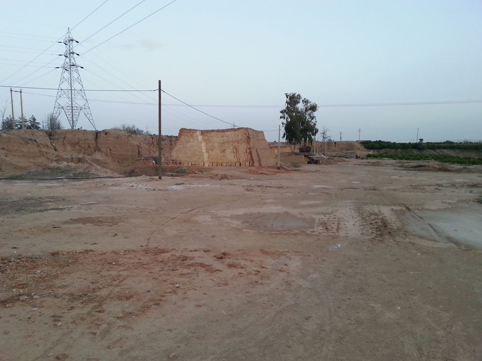 The brick factory or kooshk Ghazi